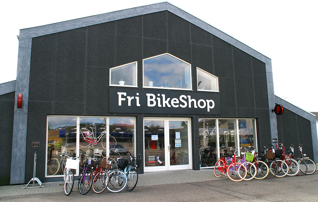 Fri BikeShop butik i Kalundborg